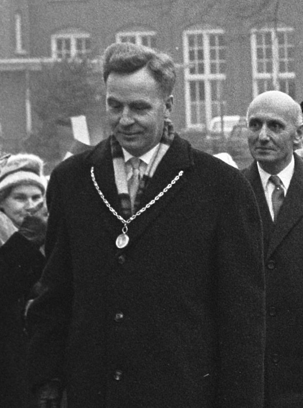 Collectie / Archief : Fotocollectie Anefo Reportage / Serie : Koningin Juliana brengt een werkbezoek aan Limburg Beschrijving : Koningin Juliana wandelt door [...] Datum : 11 december 1963 Locatie : Limburg Trefwoorden : koninginnen, werkbezoeken Persoonsnaam : Juliana, koningin Fotograaf : Fotograaf Onbekend / Anefo Auteursrechthebbende : Nationaal Archief Materiaalsoort : Negatief (zwart/wit) Nummer archiefinventaris : bekijk toegang 2.24.01.05 Bestanddeelnummer : 915-8329